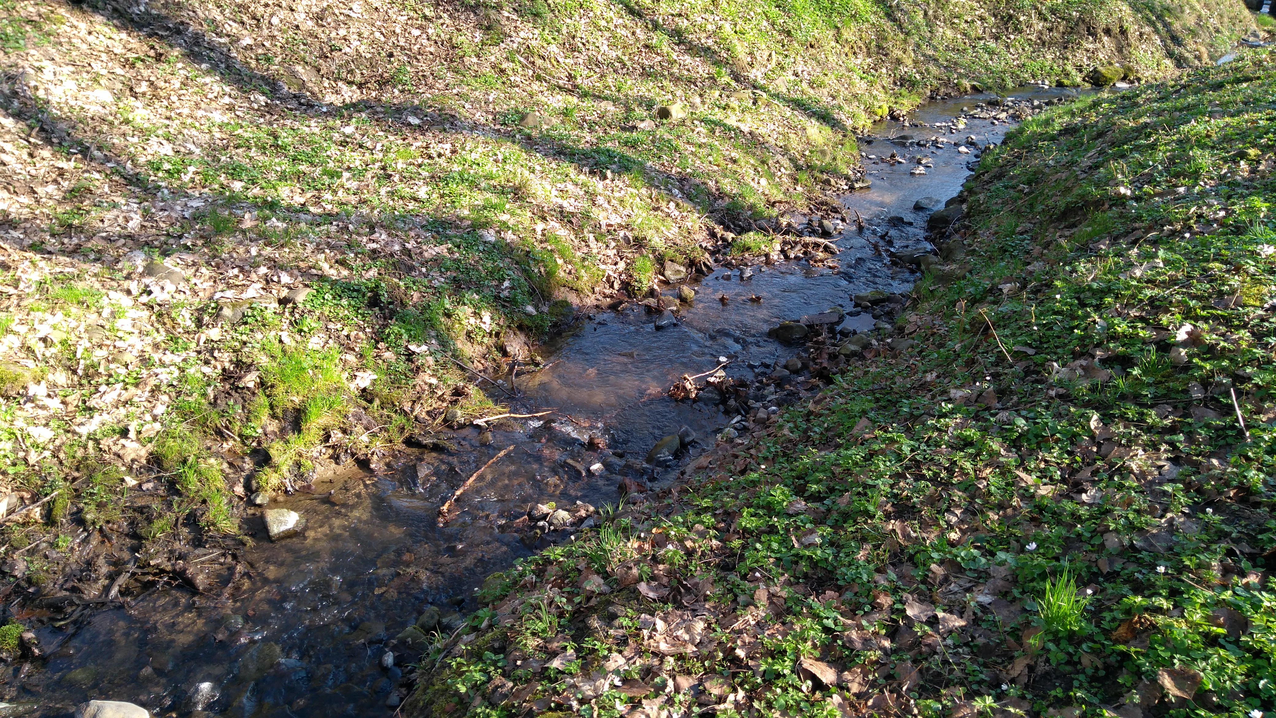 Potok.